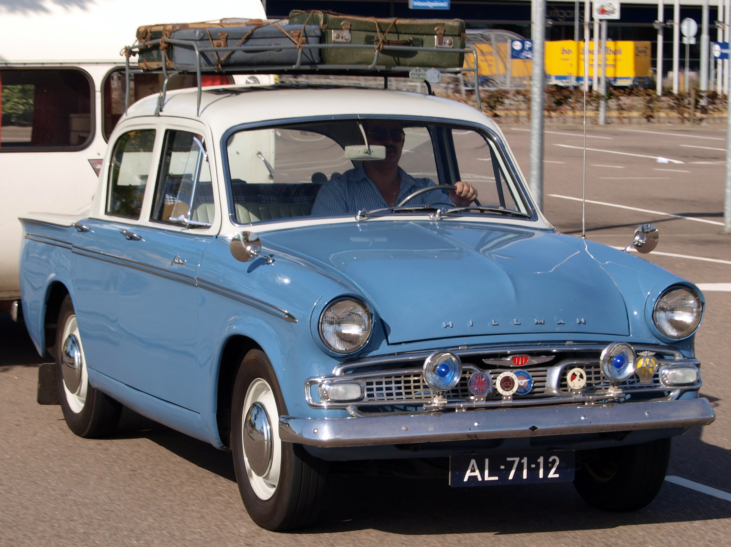 Hillman Minx III A Deluxe Saloon AL-71-12